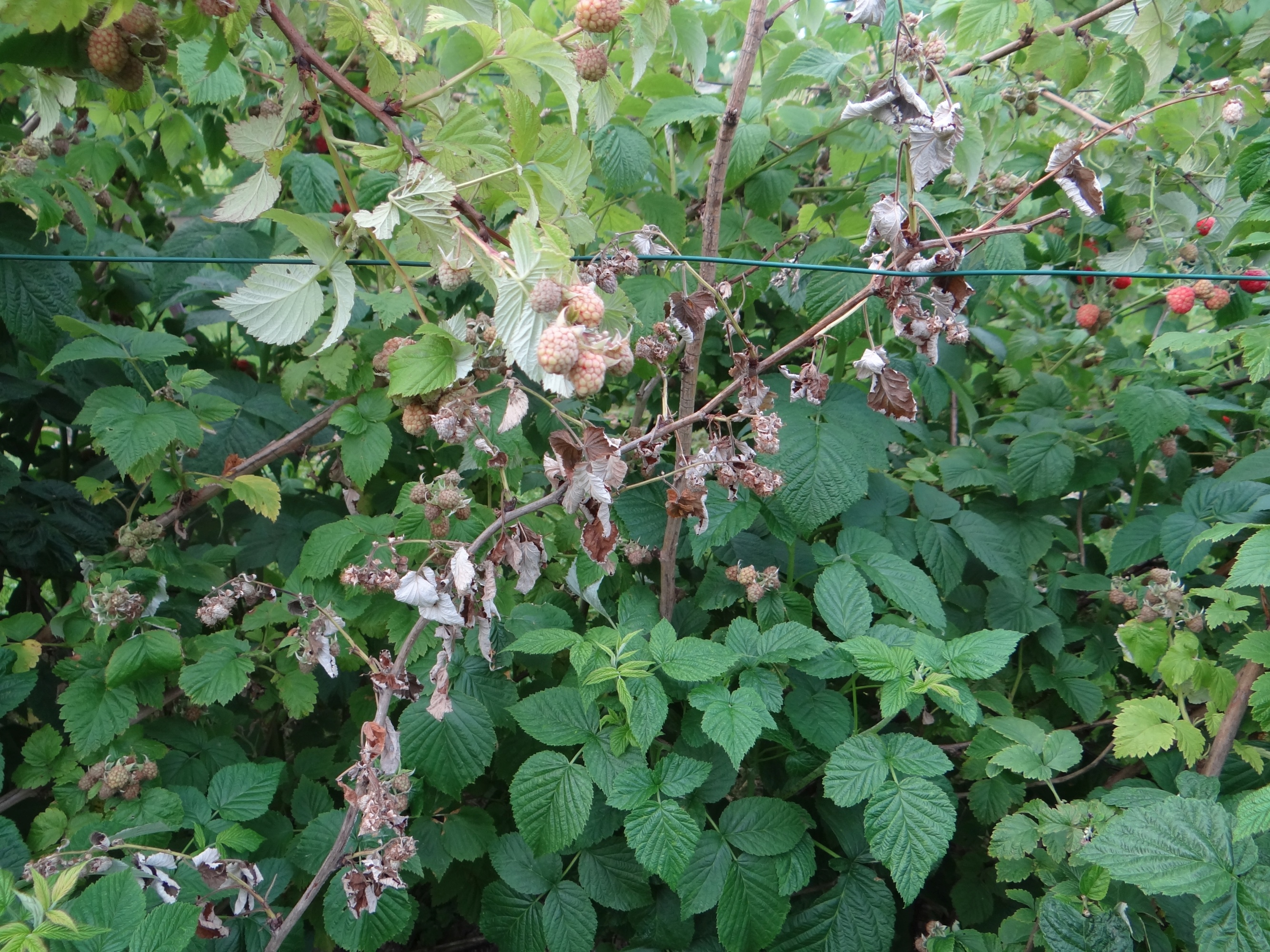 Didymella applanata on Rubus idaeus